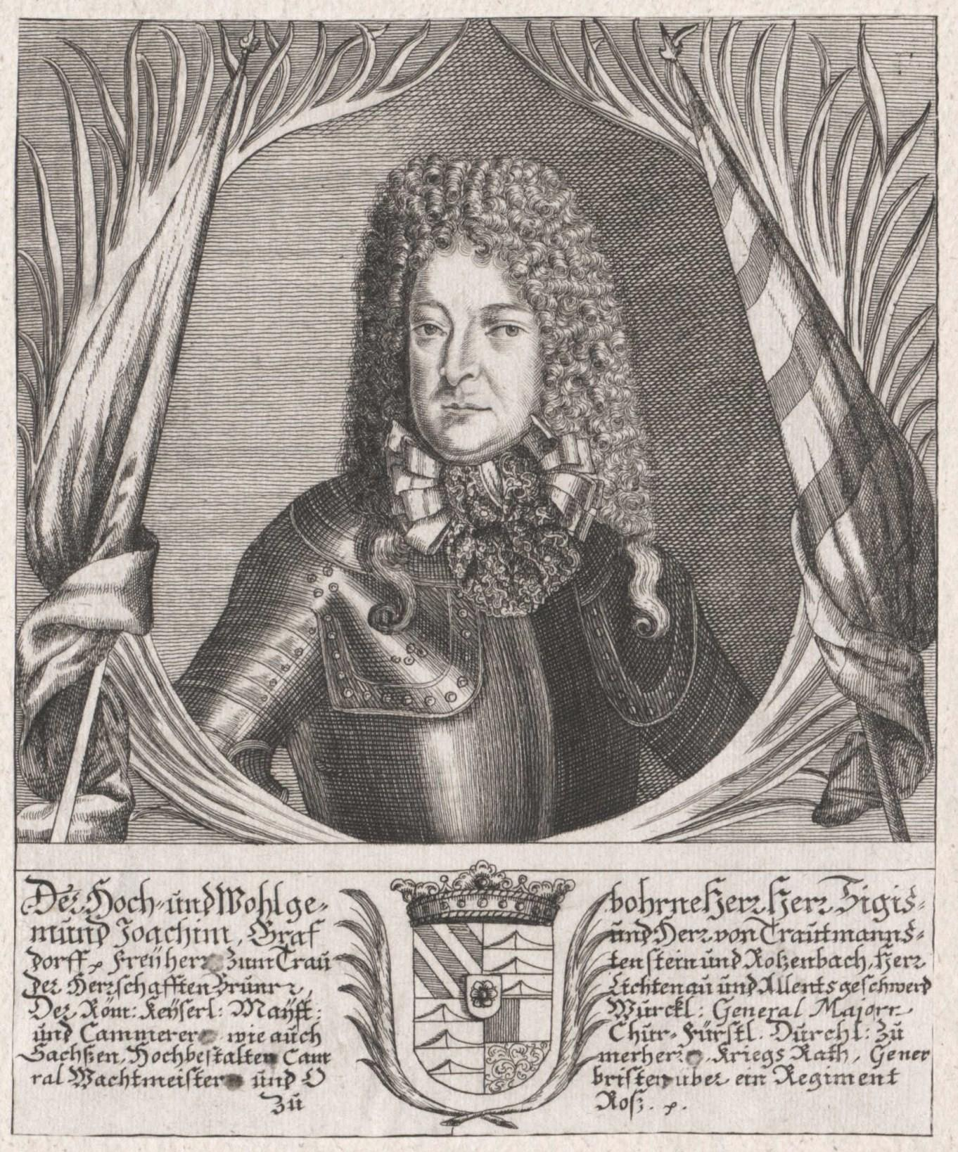 Motiv:Sigmund Joachim Graf Trauttmansdorff (um 1641–1706)